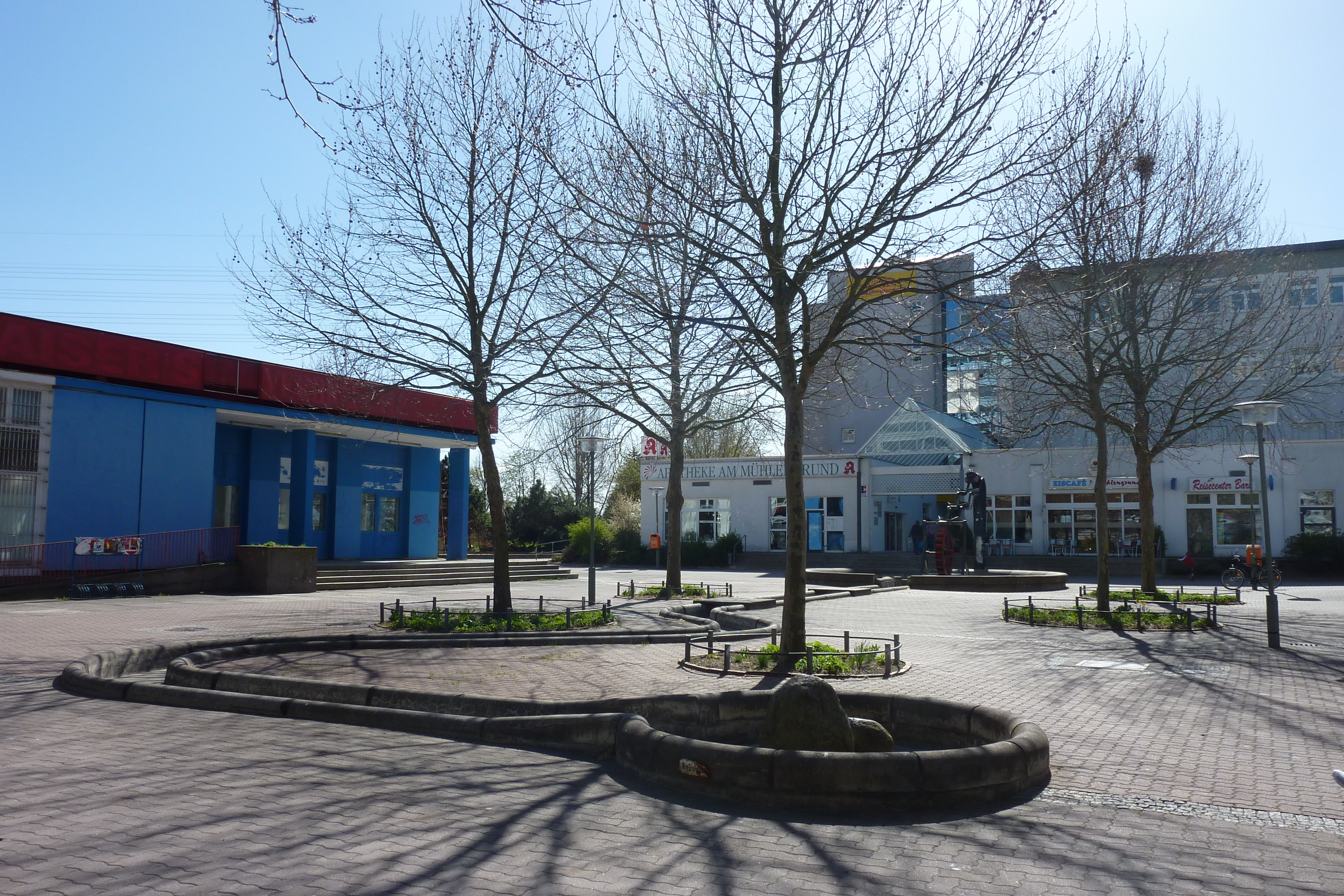 Gesamtansicht der Anlage des Mühlenradbrunnens in Berlin-Neu-Hohenschönhausen.